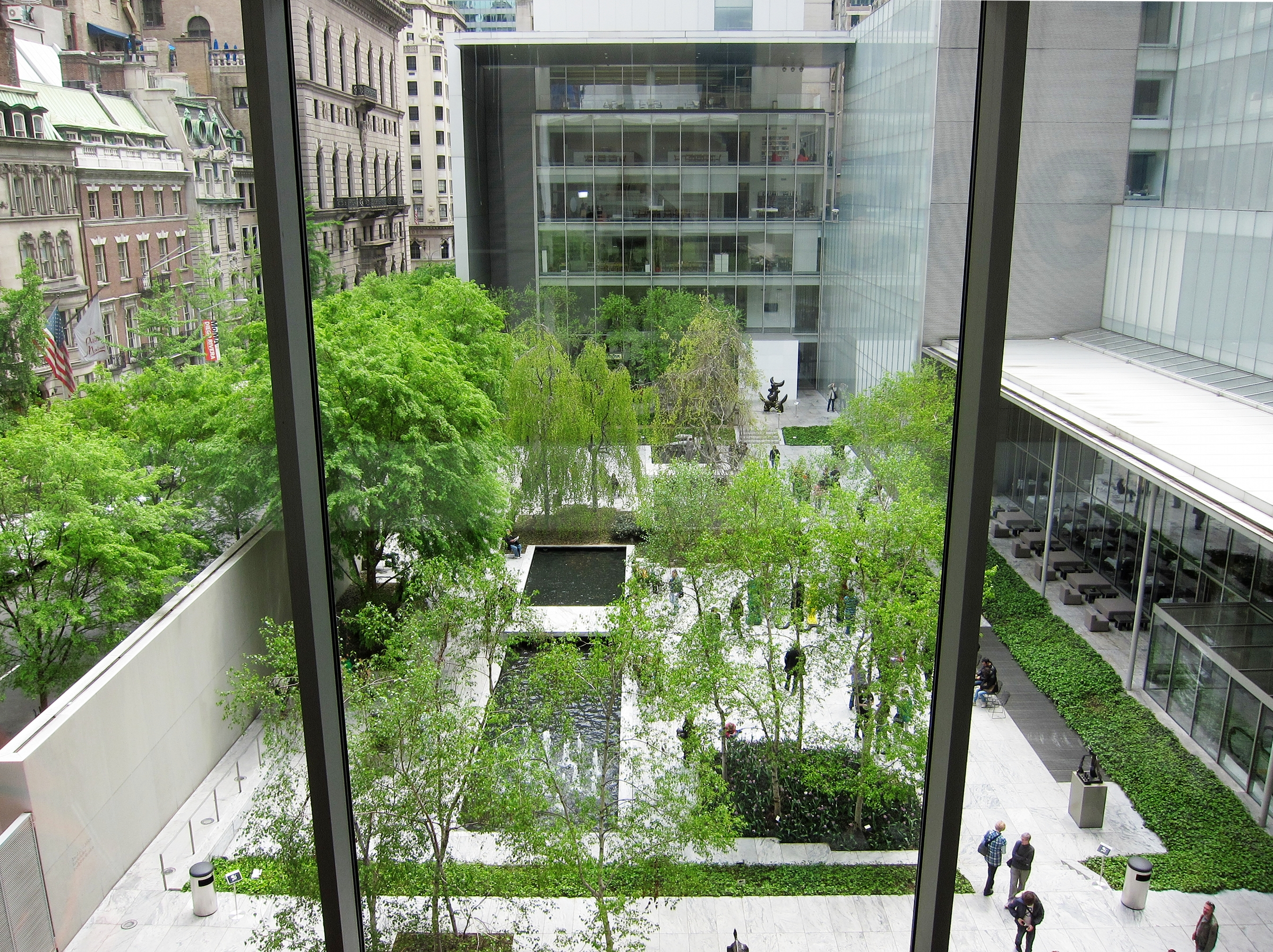 Le jardin des sculptures du MoMA.